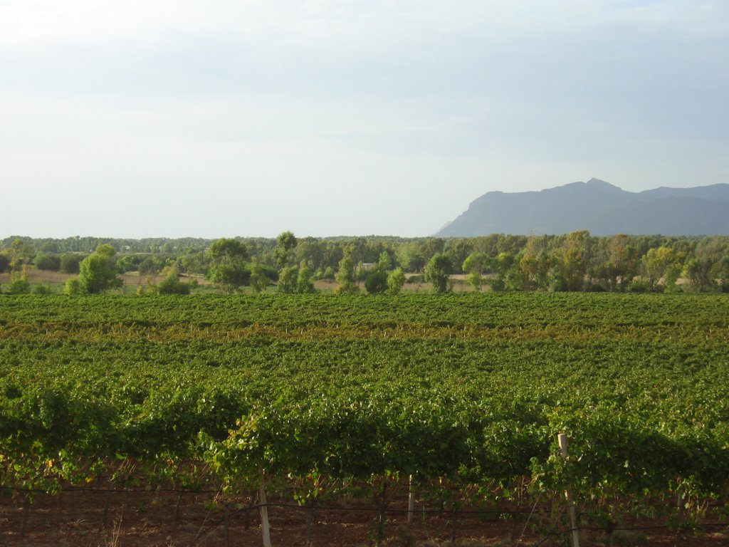 Vineyards in Sardinia